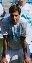 Молодіжна збірна Словенії у фіналі Турніру пам'яті Валерія Лобановського 2015